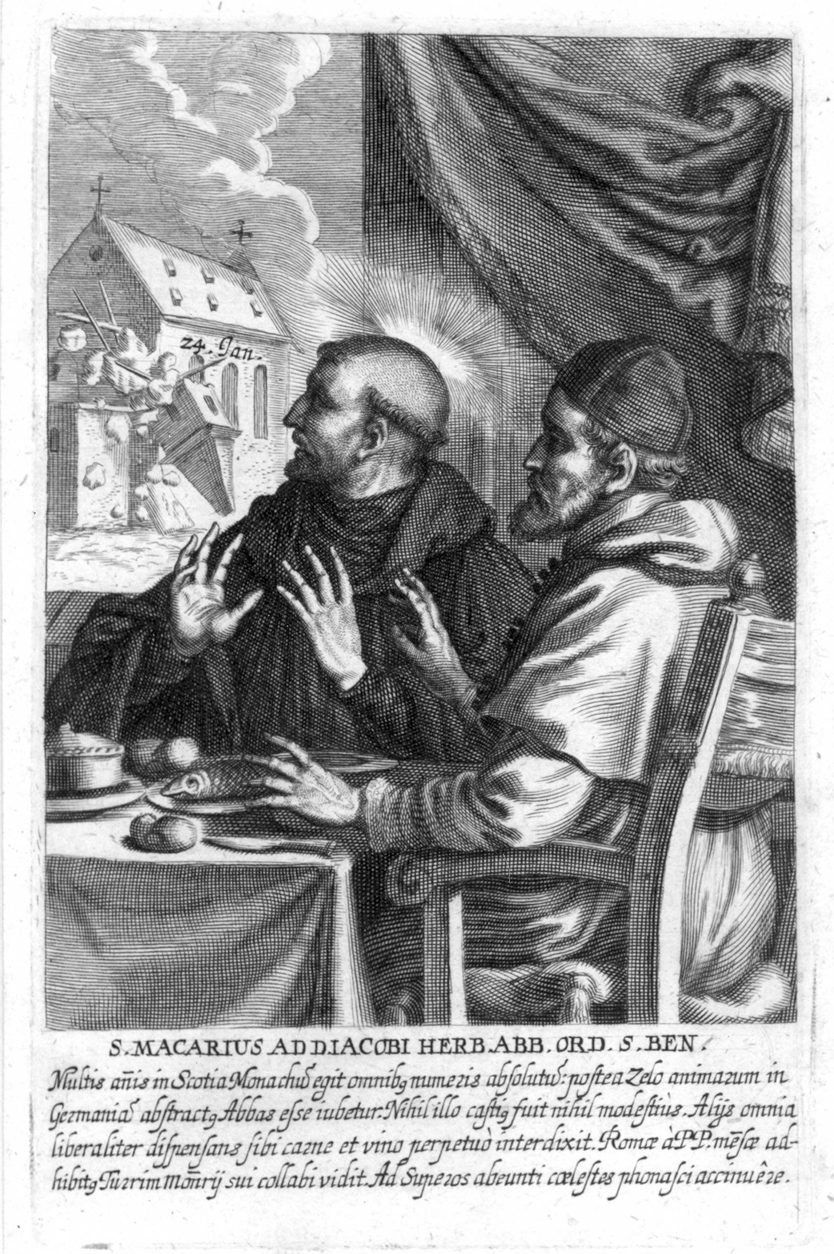 Kupferstich (Scan) über das Wein-Wasser-Wunder und den Traum vom Einsturz des Südturms der Klosterkirche St. Jakob.